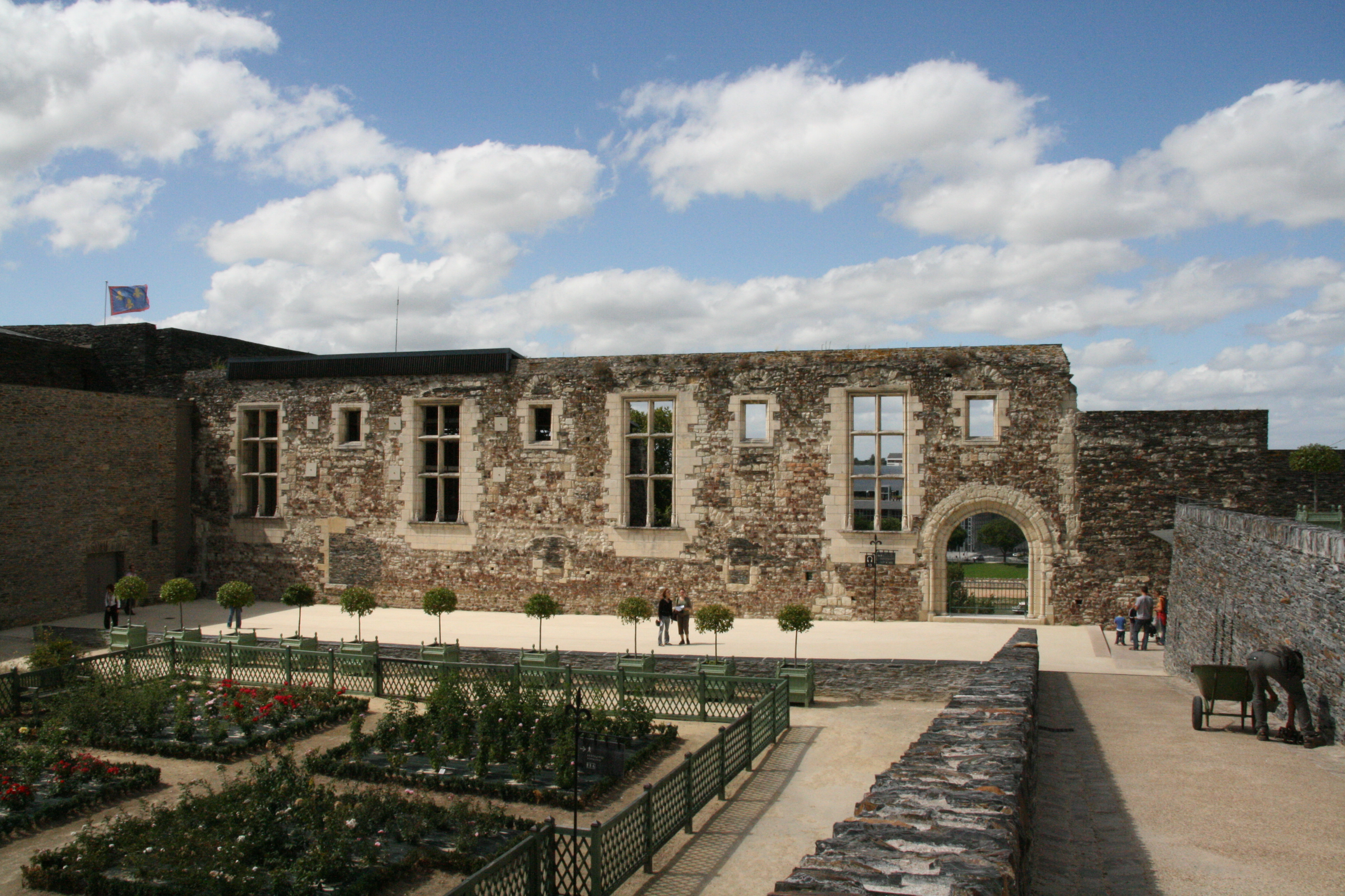 Mur de l'ancienne salle du trône (et salle de réception et de banquet) du château d'Angers, France.